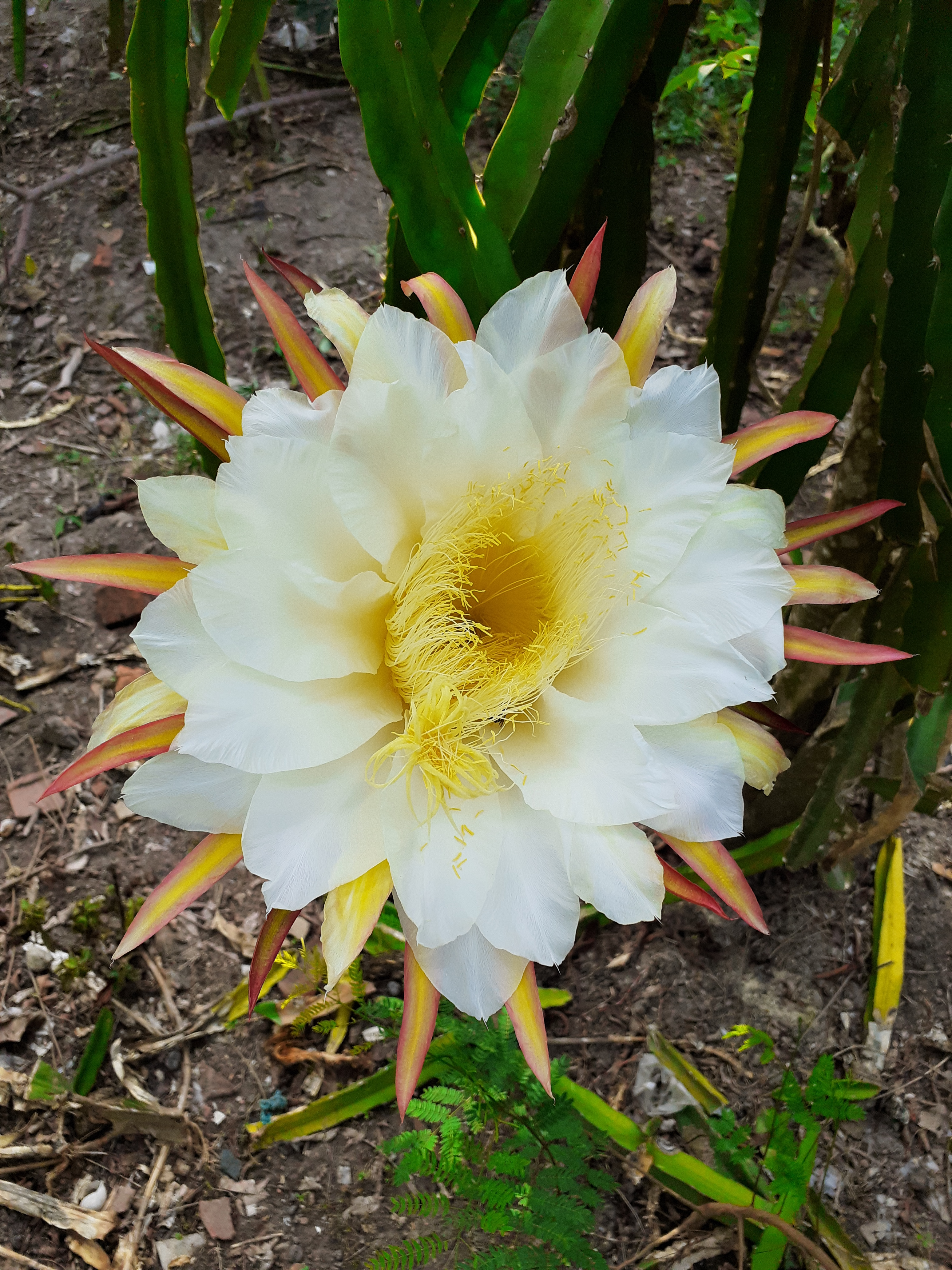 Bunga buah naga